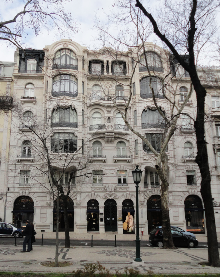 Edifício na Av. da Liberdade 206-218, Lisboa; Arq. Norte Júnior